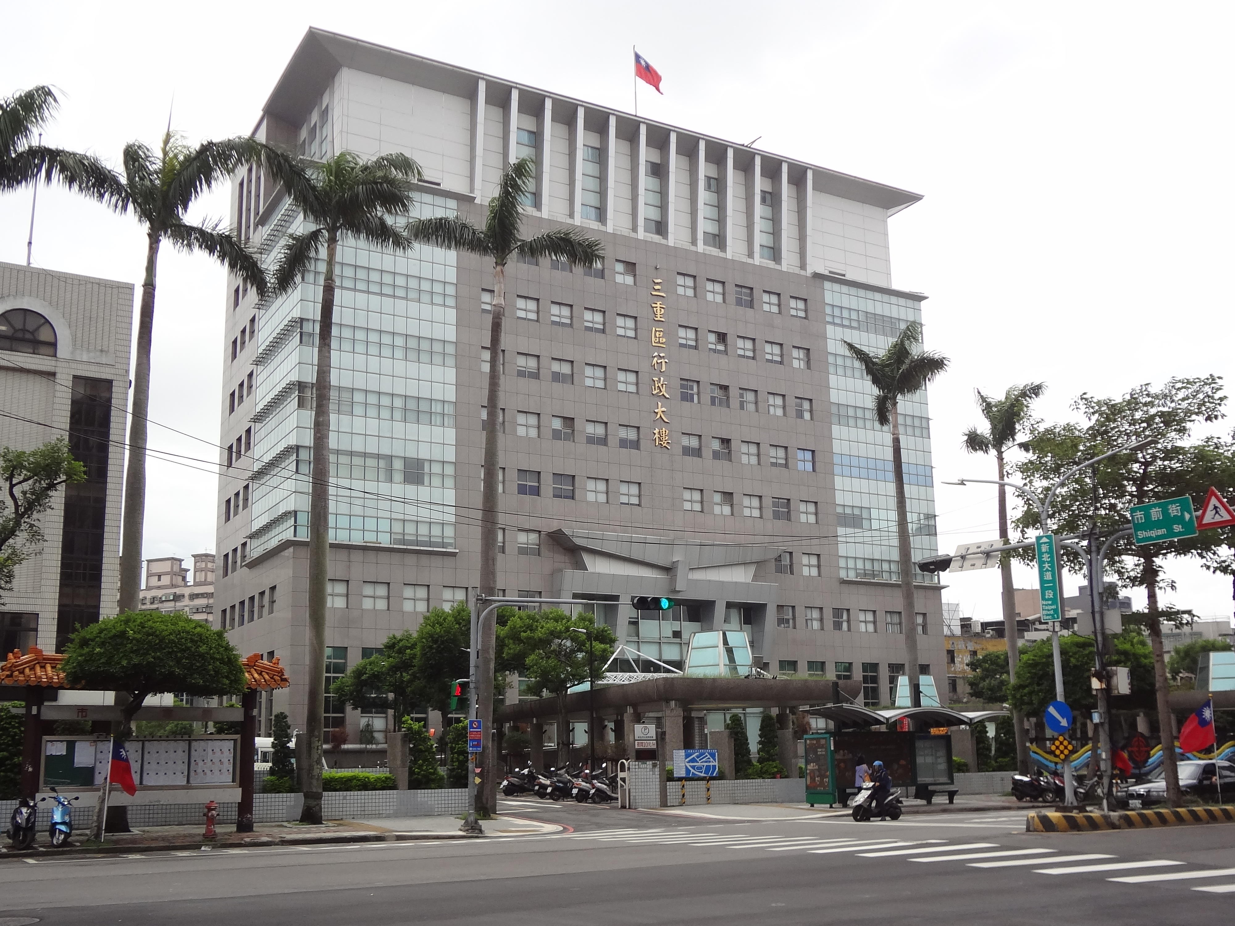 新北市三重區行政大樓，地址：新北市三重區新北大道一段11號。